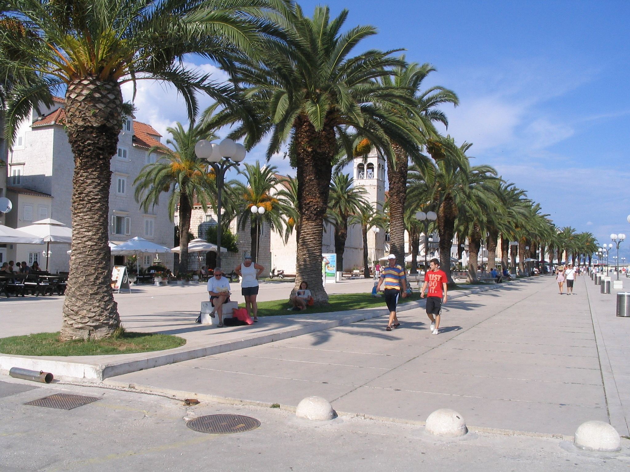 Pálmasor - Trogir, Horvátország